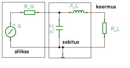 L-ahel CL. Tehtud TinaSpice'i abiga.